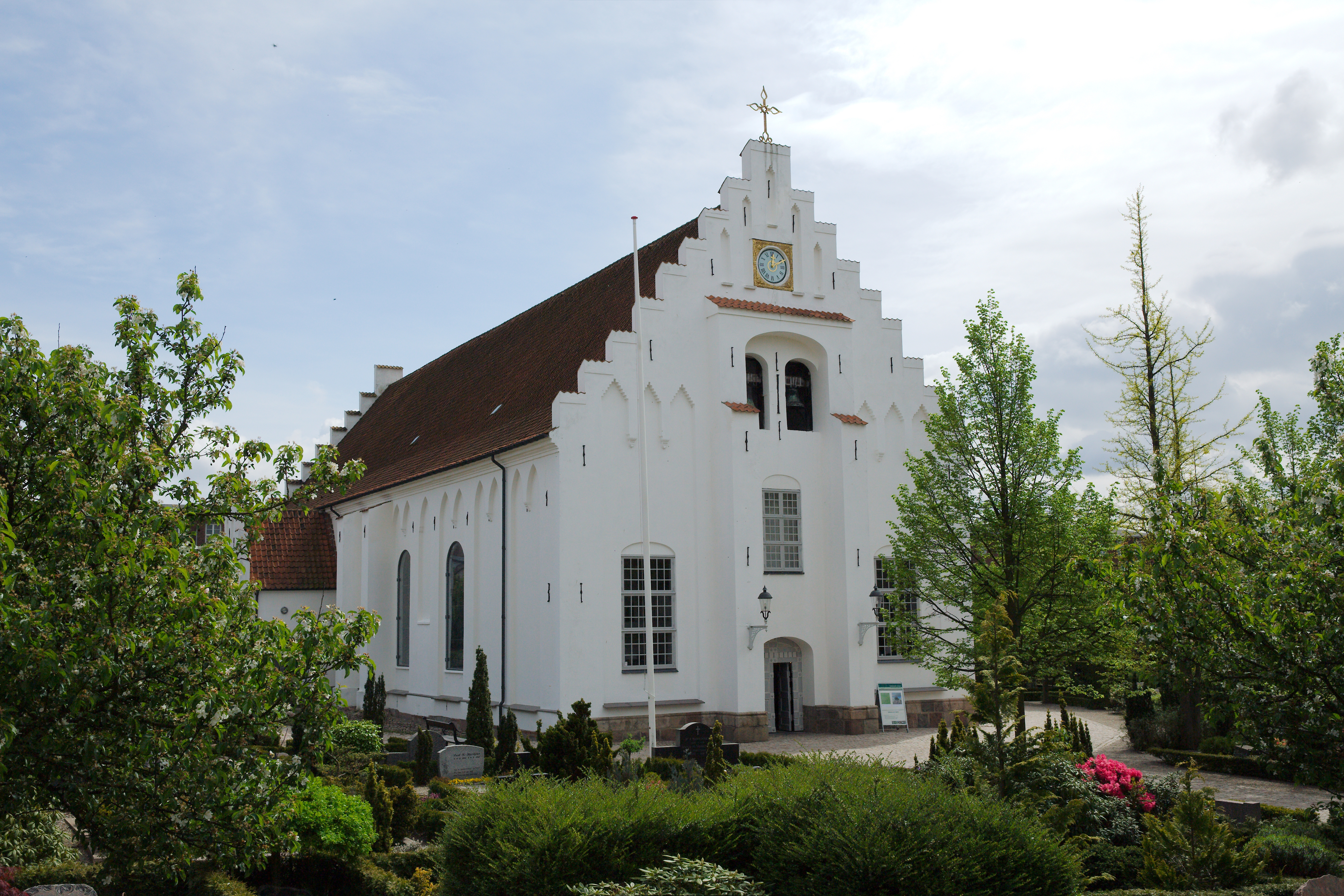 Trinitatis Kirke (Fredericia)